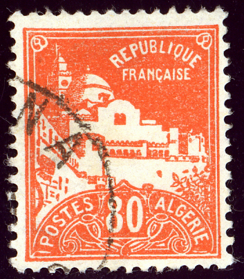 Timbre de l'Algérie française, émission de 1926, 80 c rouge-orange, Yvert N°50.